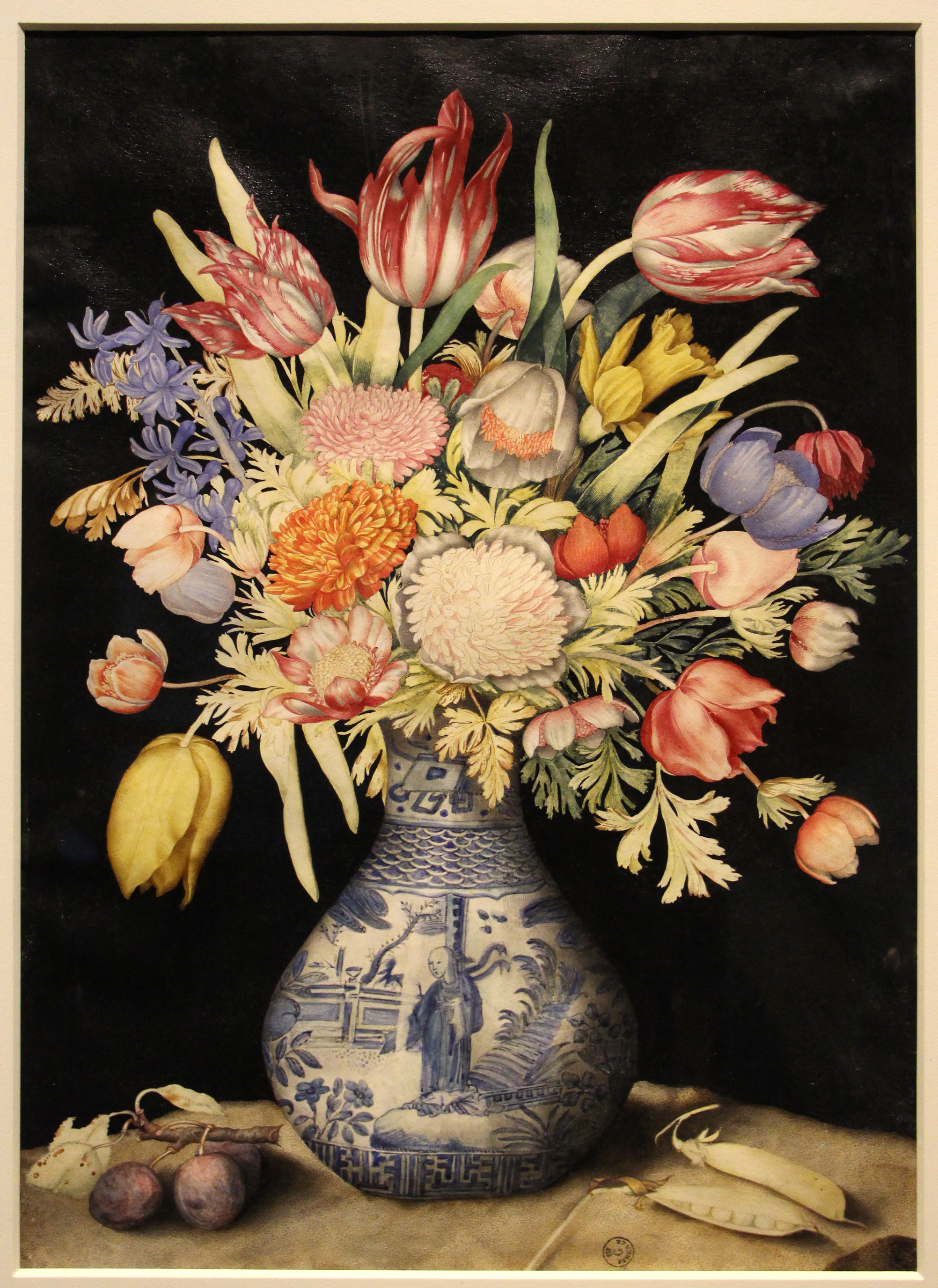 Villa medicea di Poggio a Caiano - MIBAC The making of this document was supported by Wikimedia CH. (Submit your project!) For all the files concerned, please see the category Supported by Wikimedia CH. This is a photo of a monument which is part of cultural heritage of Italy.